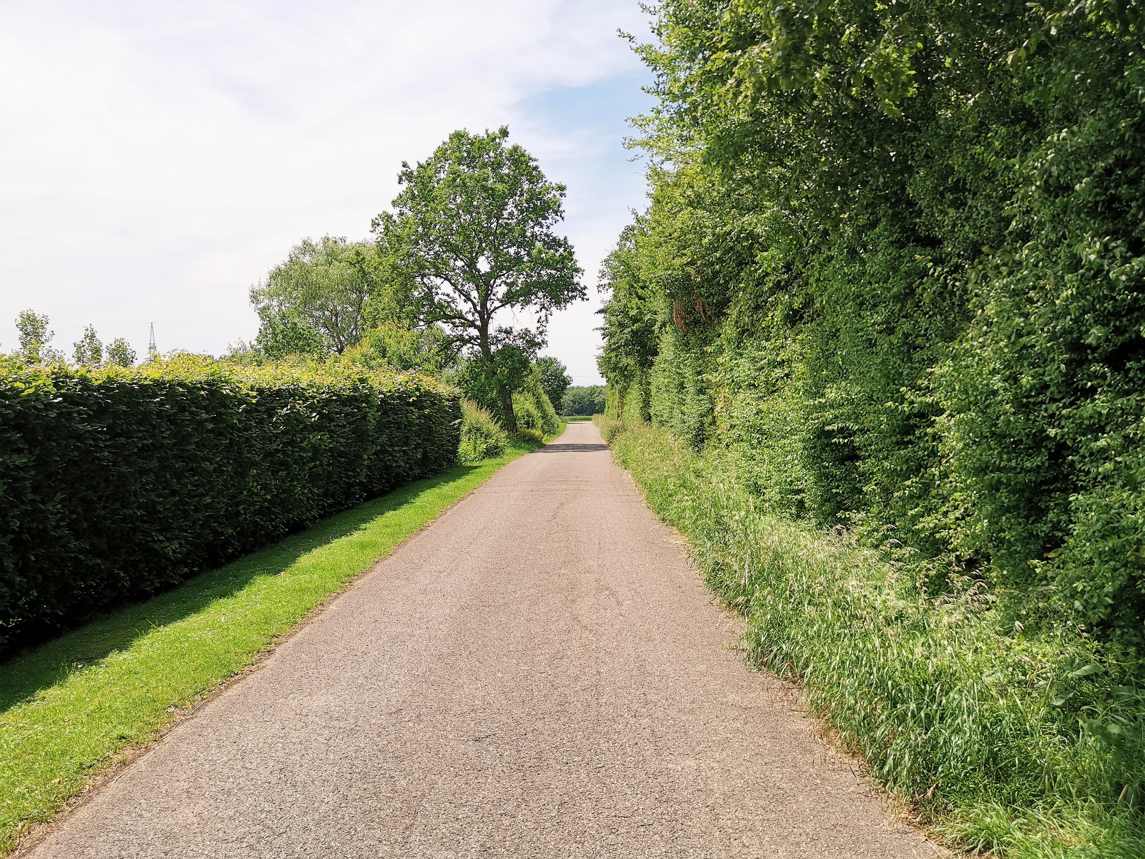 itinéraire cyclable Nicolas Frantz (PC13) à Mamer, Bambësch. Vue en direction ouest.